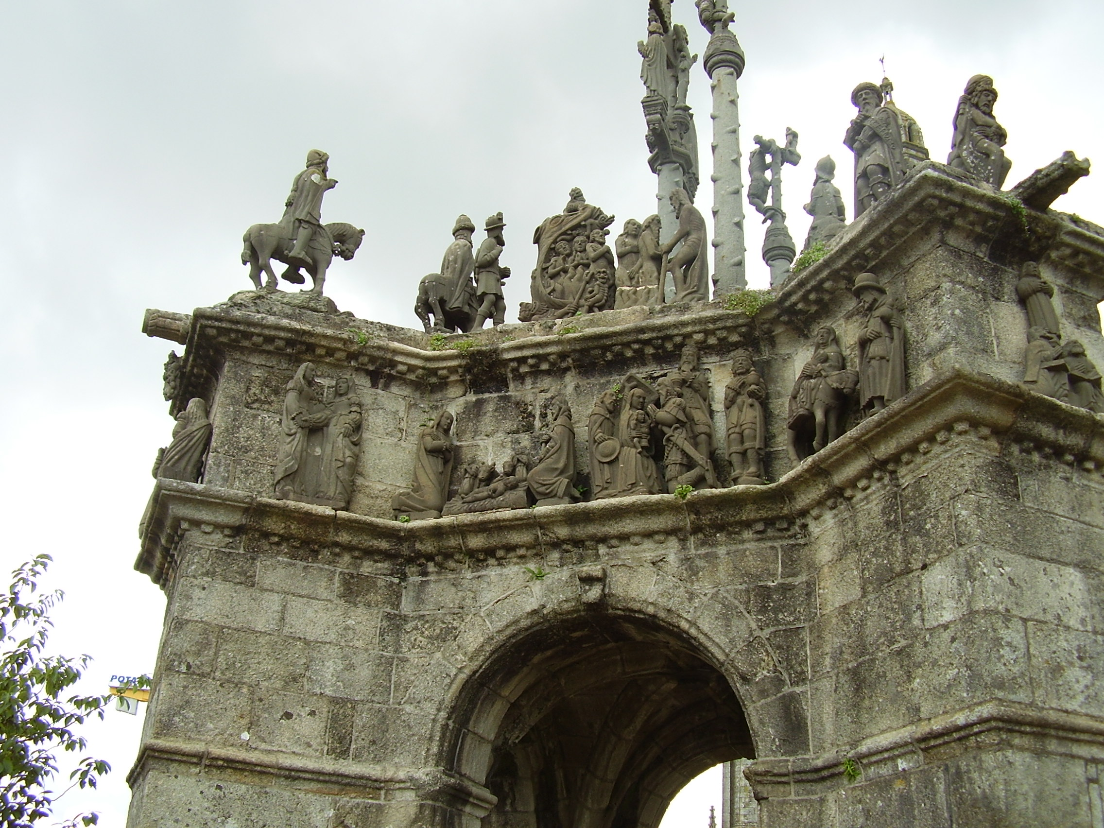 Pleyben, Pfarrbezirk mit monumentaler Calvaire und Kirche, Frankreich; Calvaire